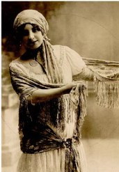 María Yáñez García, coneguda amb el nom artístic de Bella Dorita (1901-2001), als anys 1920. Artísta de varietats.